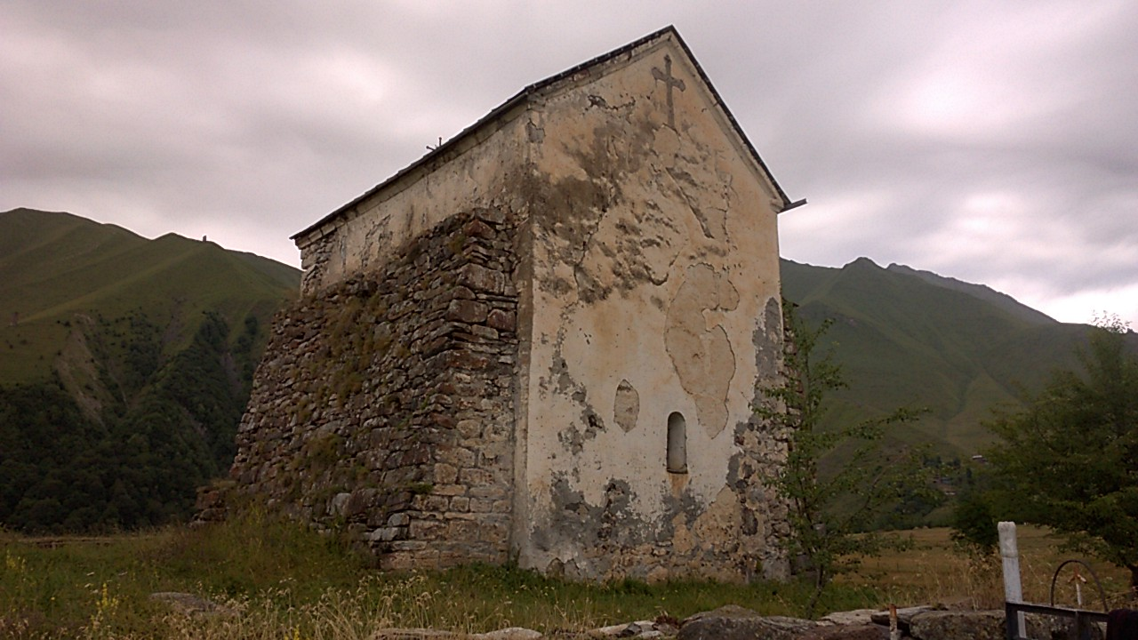 მთავარმოწამის ეკლესიის კომპლექსი